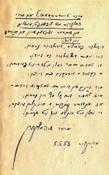 Рукопись стихотворения С.З. Галкина Посвящение См. обсуждение